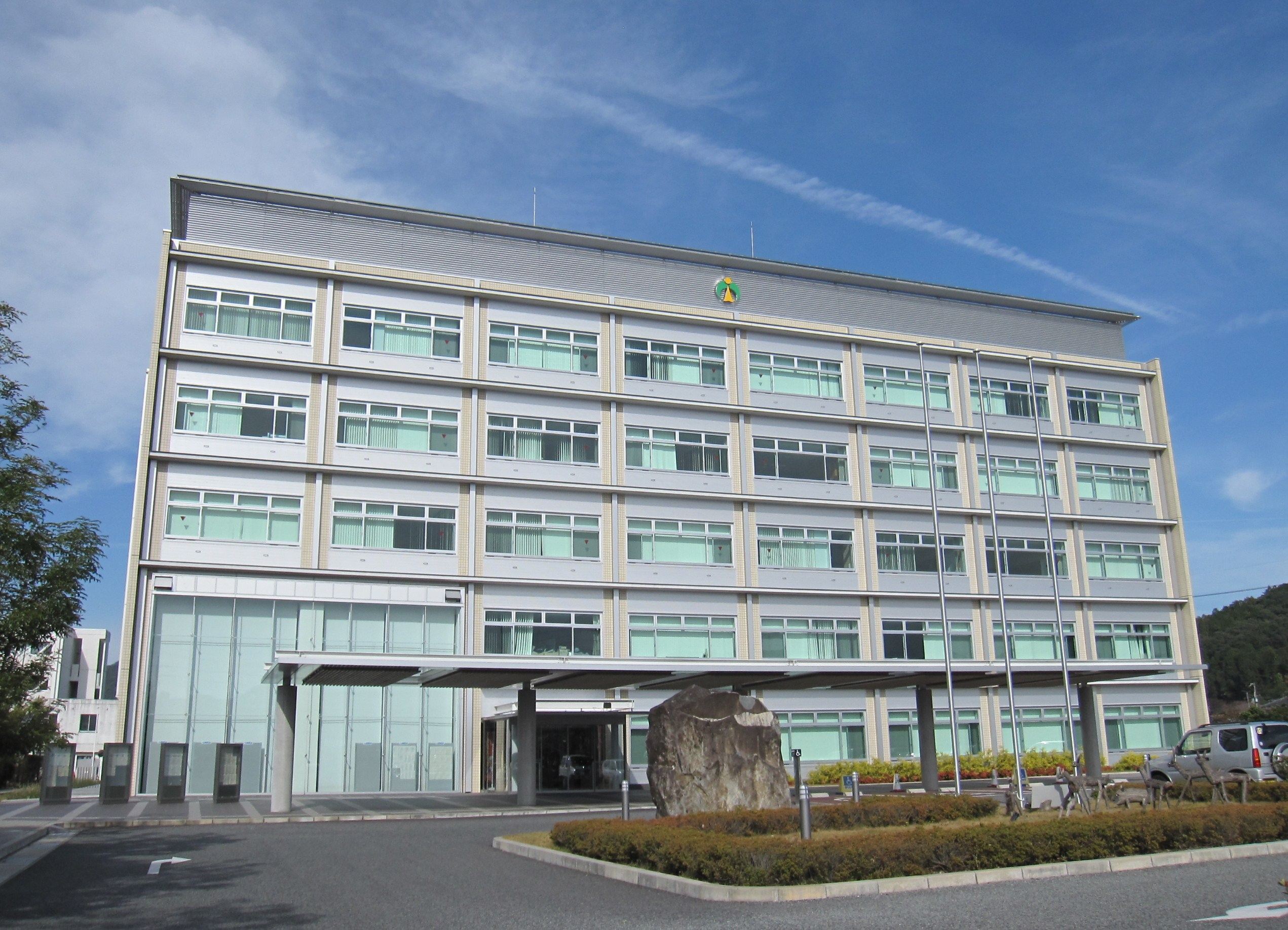 宍粟市役所